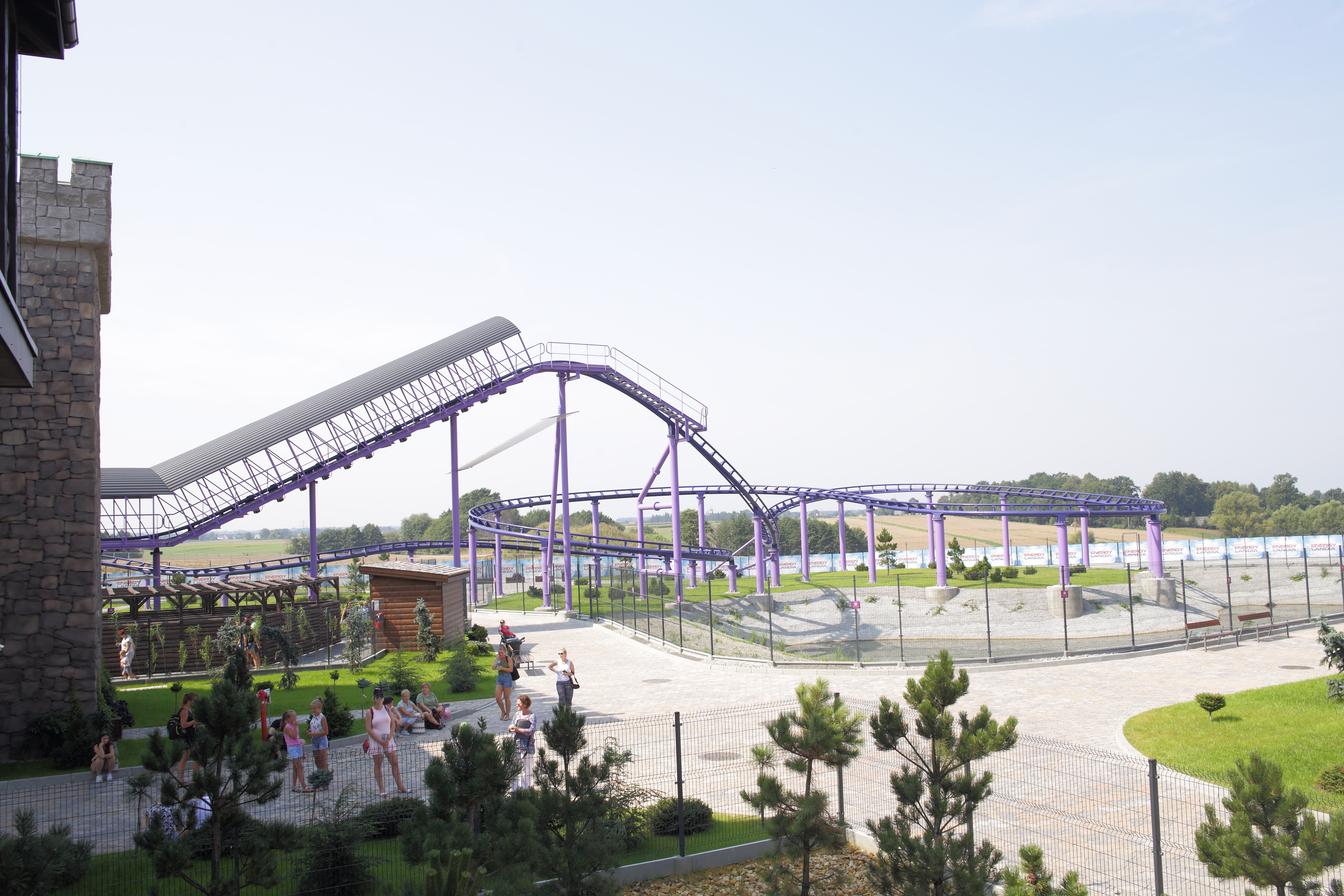 Frida - rodzinny roller coaster w parku Energylandia w Polsce.